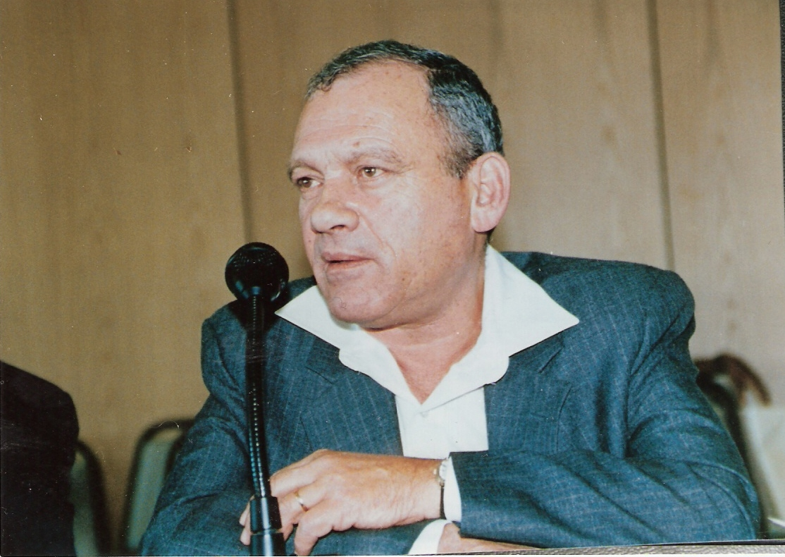 אורי גורדון